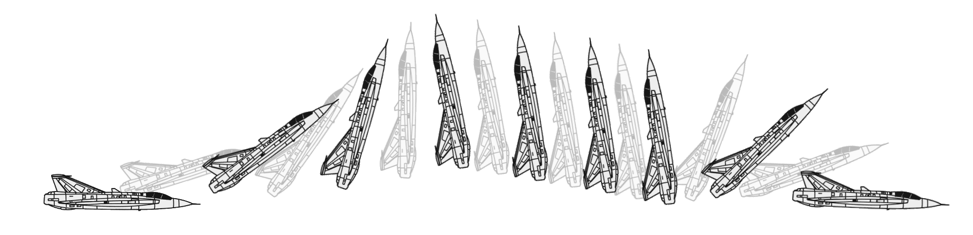 Flygmanöver kort parad, känd som kobramanövern i popkultur.